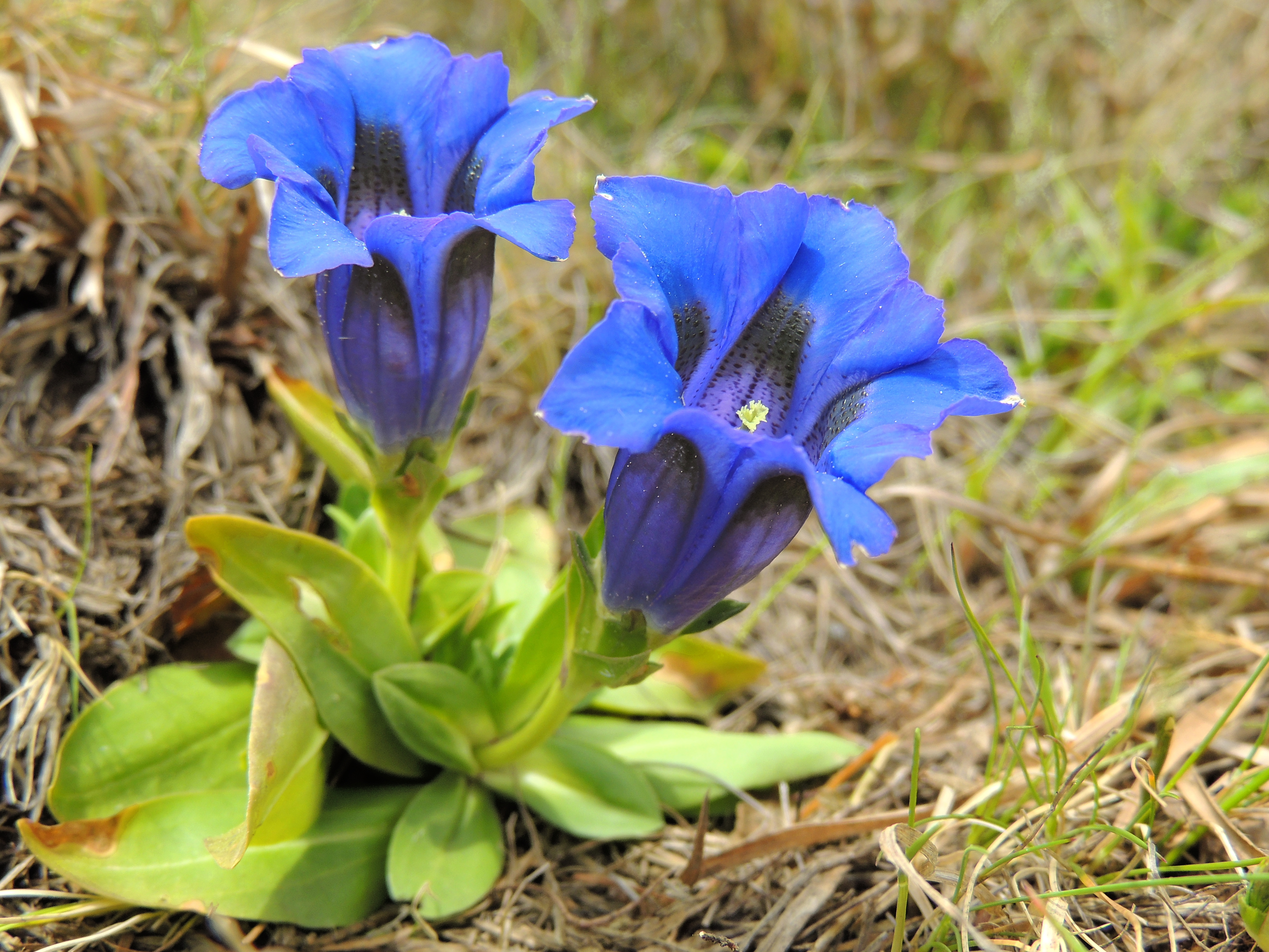 stemless gentian Kochscher Enzian cupă